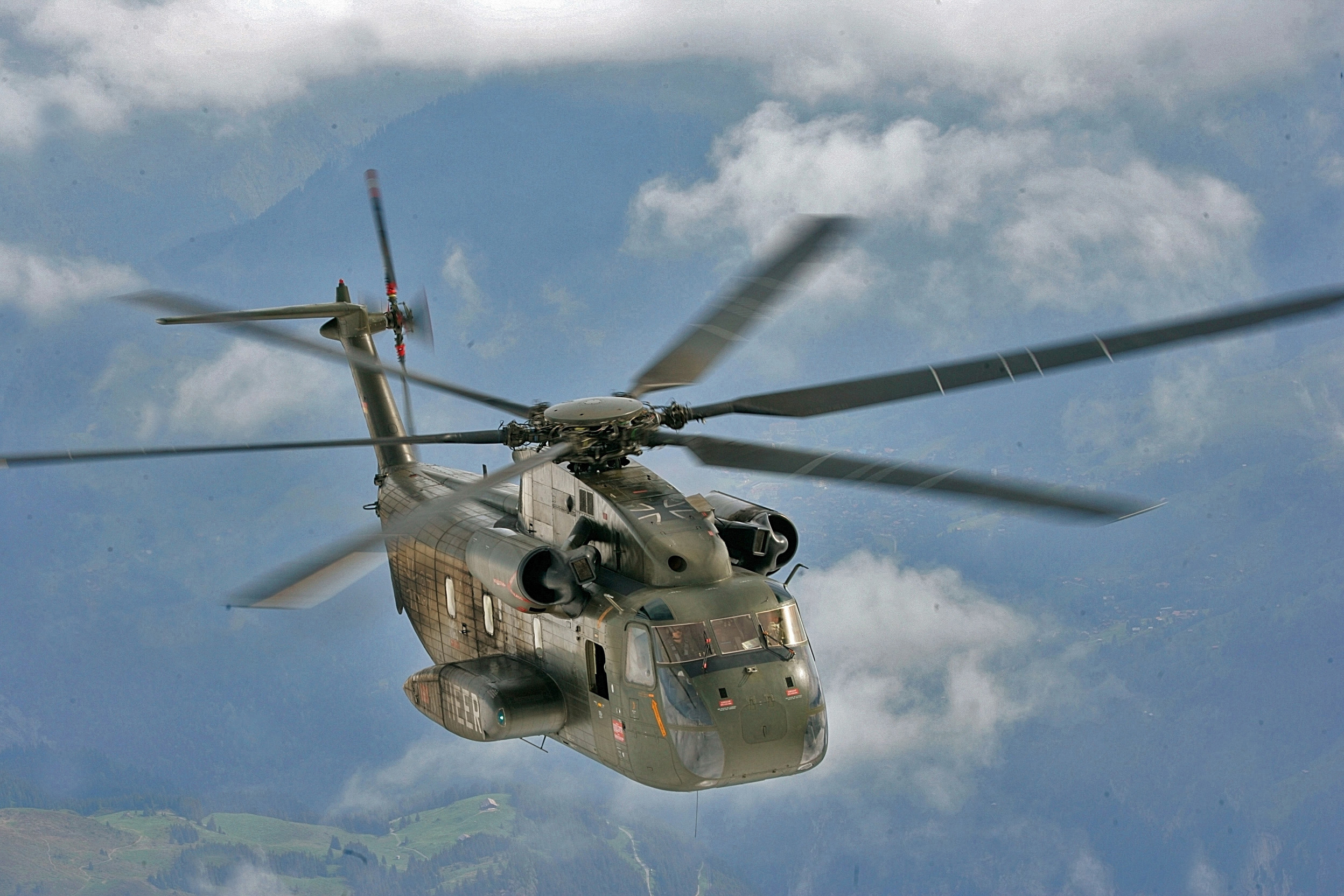 Mittlerer Transporthubschrauber CH 53 (Cargo Helikopter 53) im Gebirgsflug beim Cross Training in den Schweizer Alpen. ©Bundeswehr/Herholt